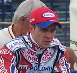 Piotr Protasiewicz, żużlowiec (polish speedway rider)